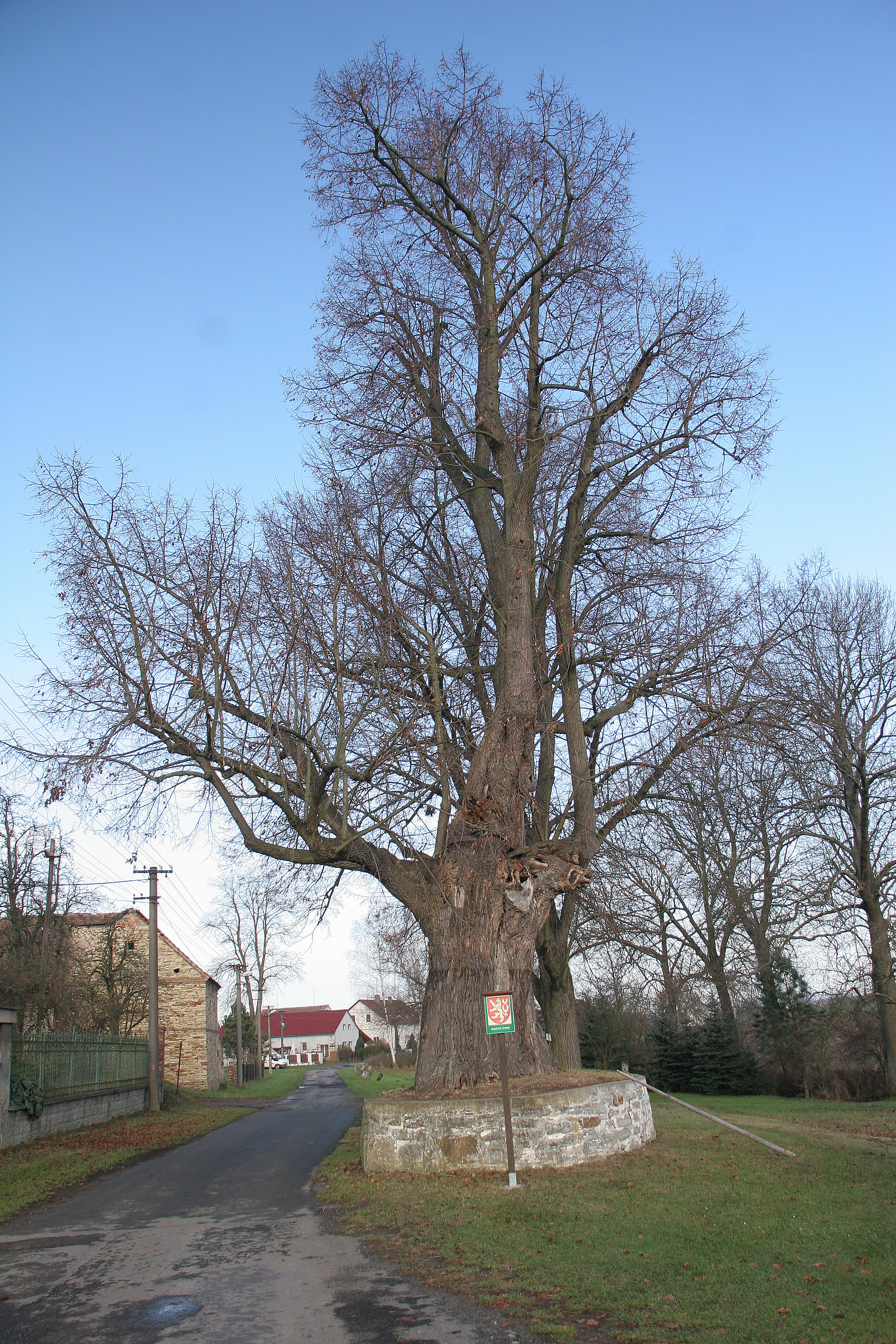 Polánky nad Dědinou památná lípa